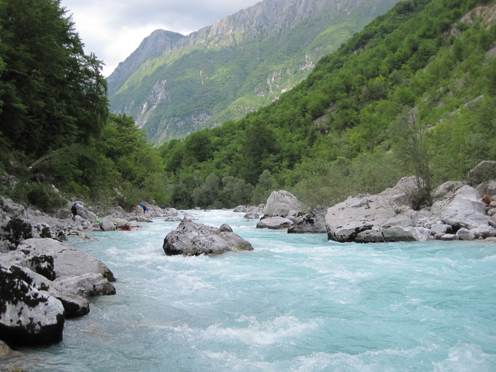 Soca in Slowenien bei Bovec